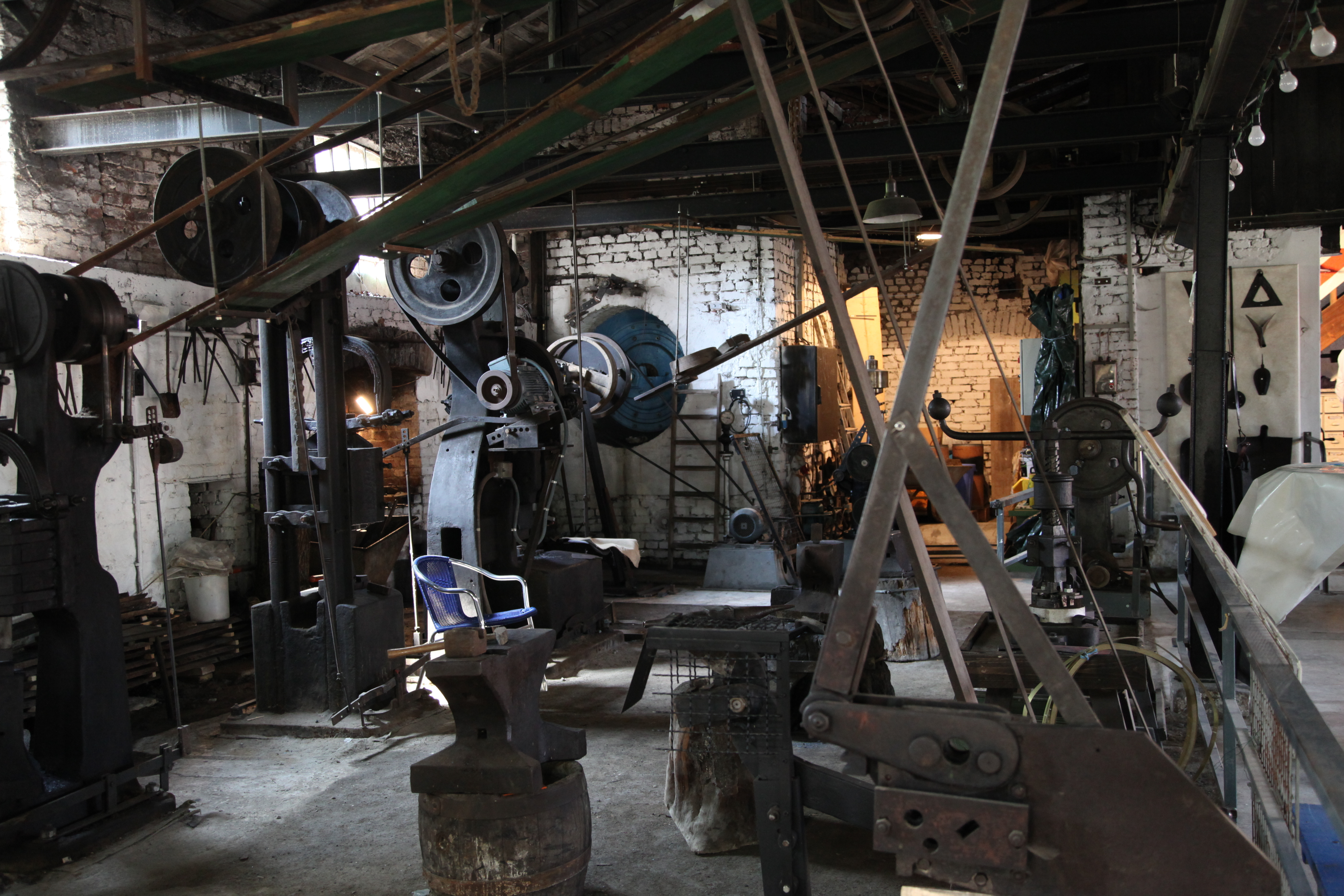 Rekonstruiertes Hammerwerk mit Werkstatt im Schleiper Hammer in Kierspe-Schleipe am deutschen Mühlentag 2012